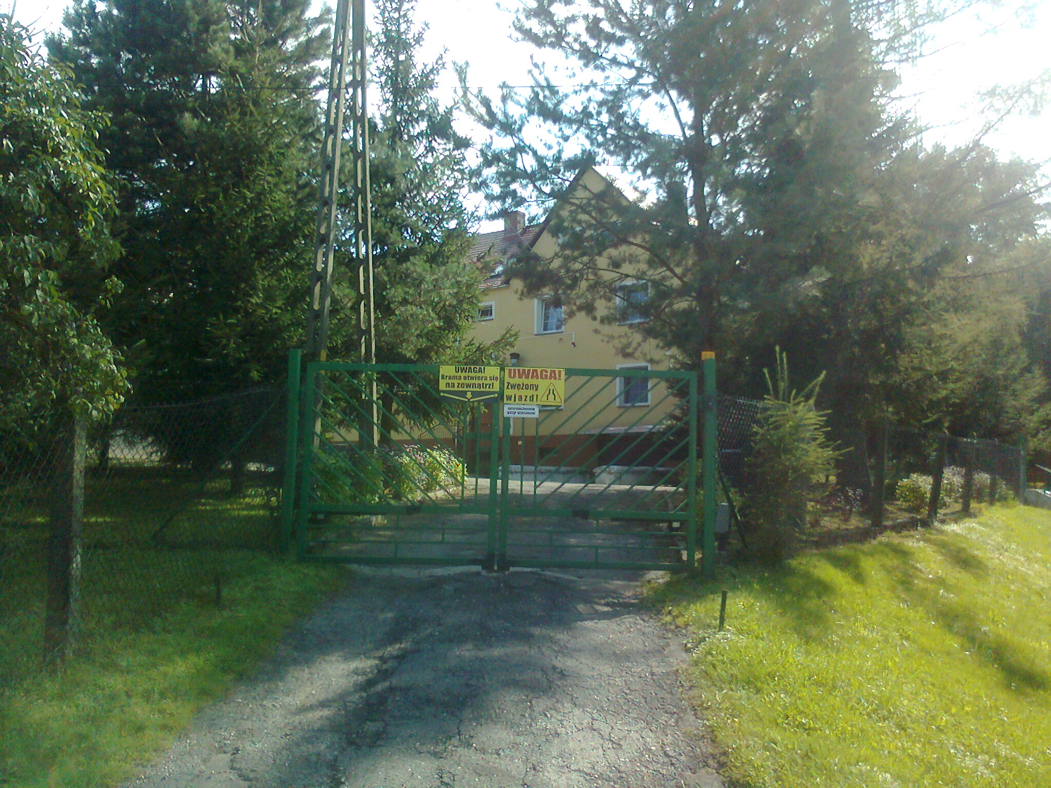 Jasienica Górna, budynek byłej Strażnica Wojsk Ochrony Pogranicza Jasienica Górna (WOP), od 16 maja 1991 roku Strażnica Straży Granicznej w Jasienicy Górnej (SG), a od 24 sierpnia 2005 roku placówka Straży Granicznej, do 14 czerwca 2006 roku — brama wjazdowa. Obecnie budynek mieszkalny